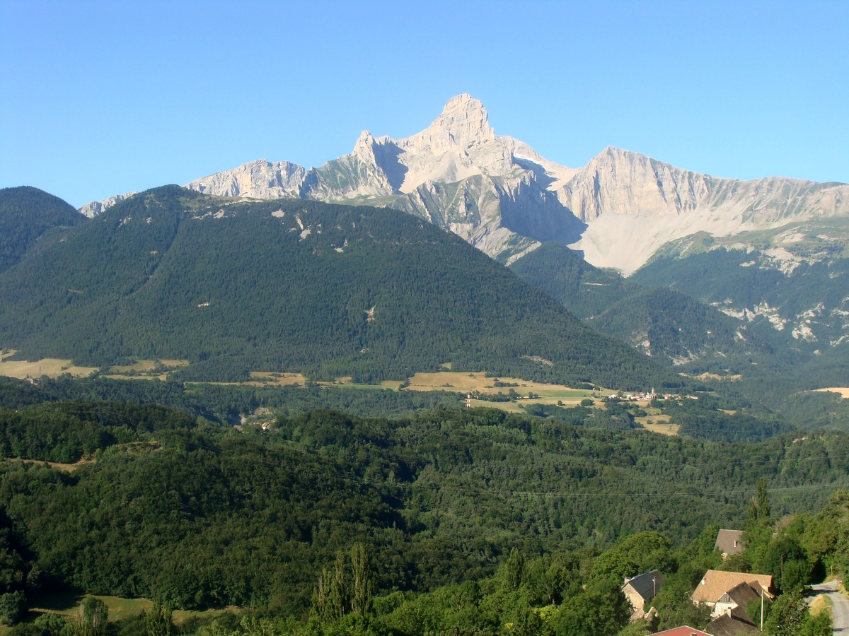 L'Obiou vu depuis la route Napoléon (RN 85) aux environs de Corps (Isère).